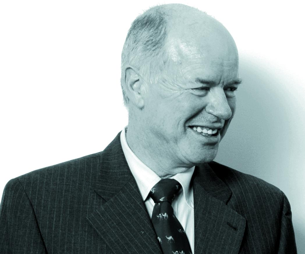 (Justus) Henning von Boehmer, born 1943